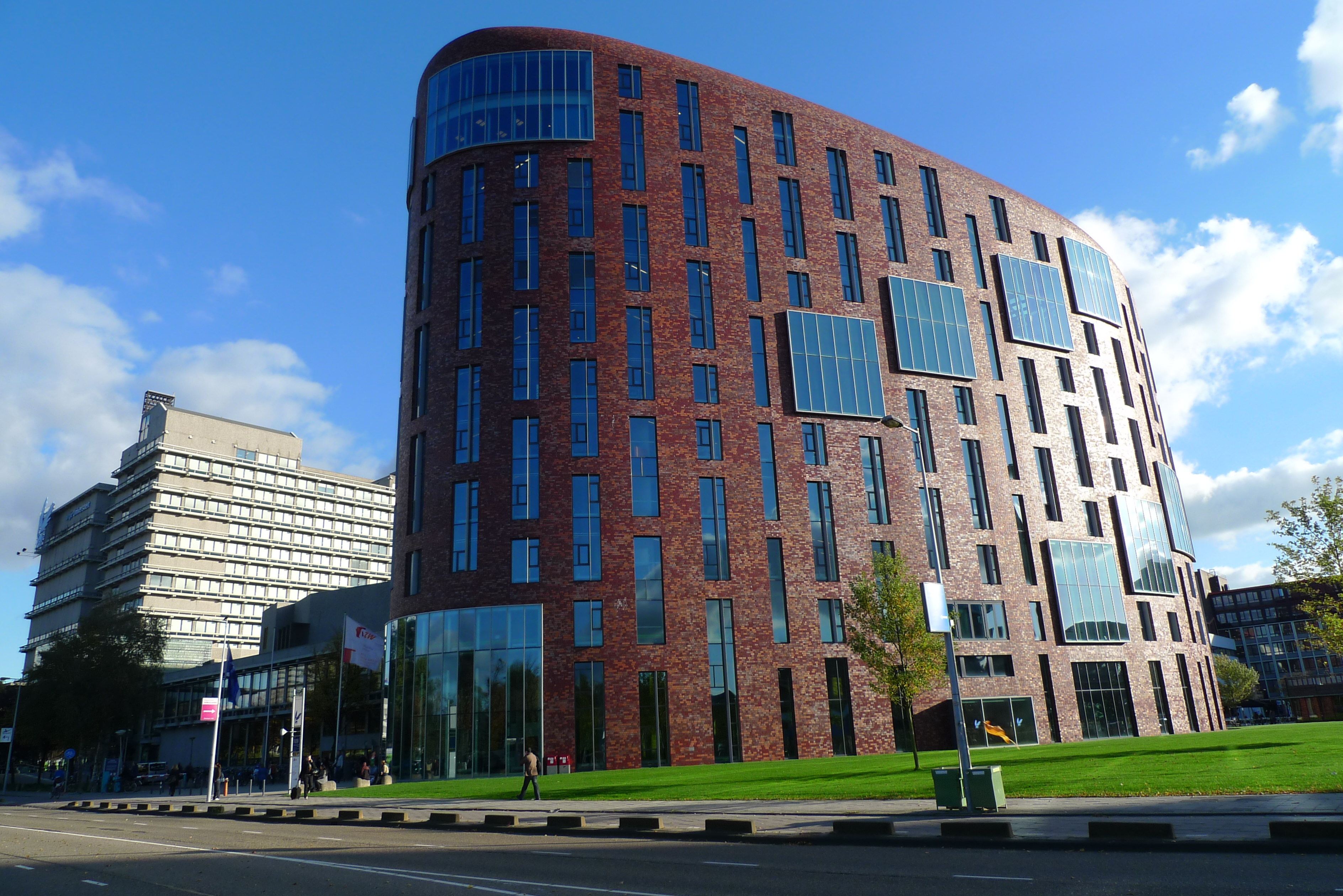 OZW gebouw - Amstel Academie - Vrije Universiteit Amsterdam